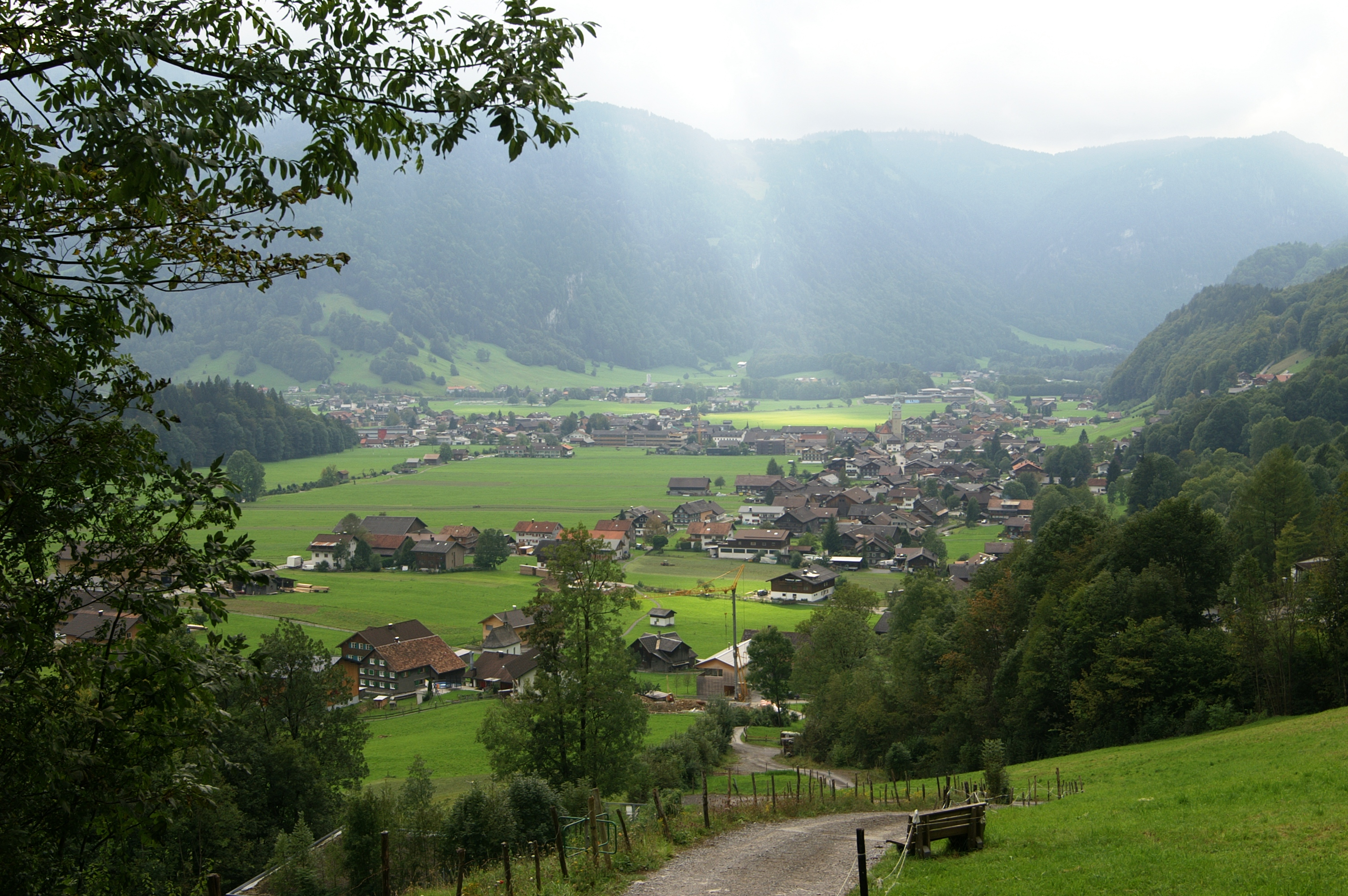 Gemeinde Bezau Blick von der Halde.